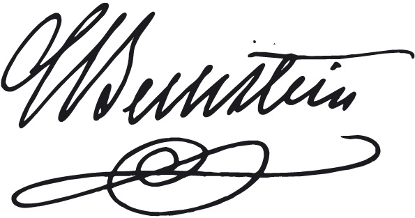 Unterschrift von Carl Bechstein